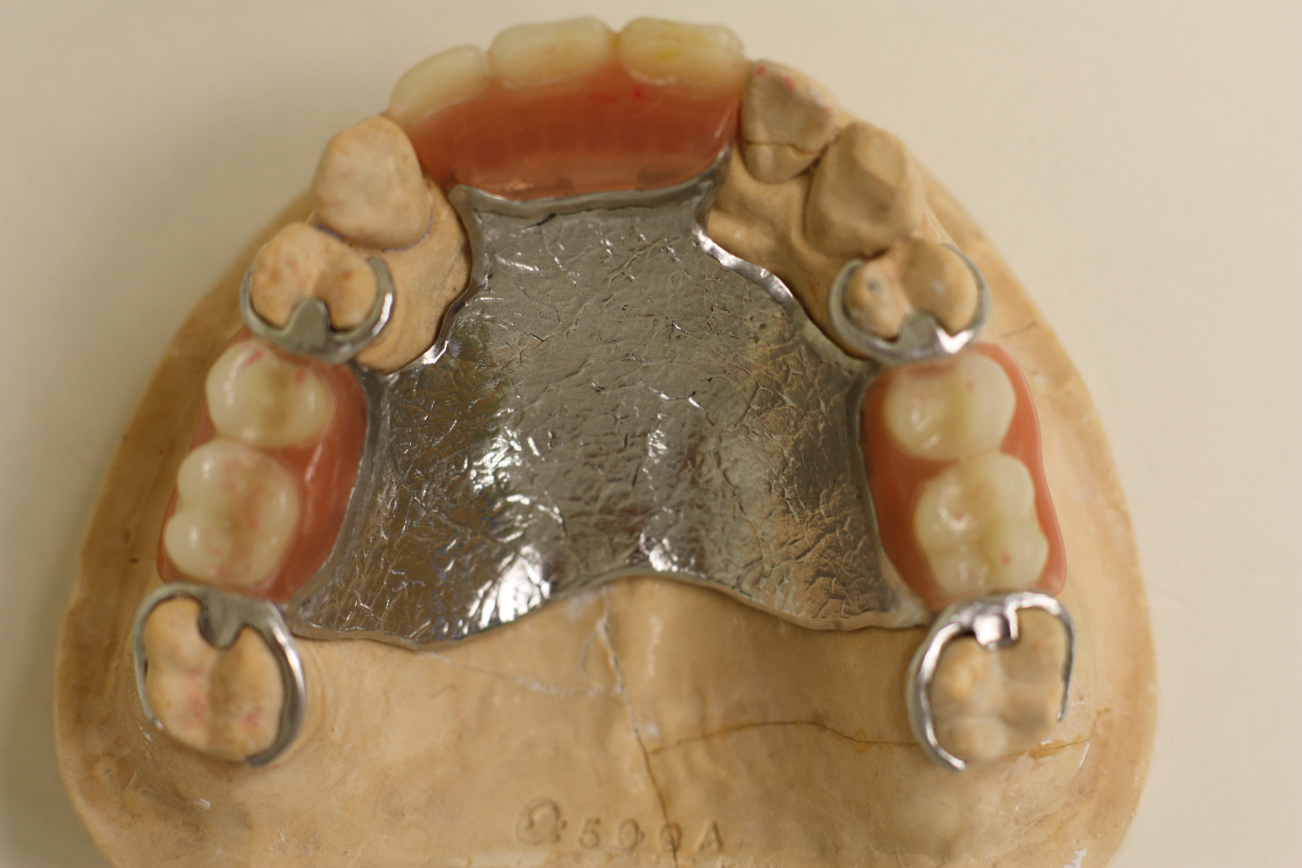 Teilprothese, Modellguss, Modellgussprothese